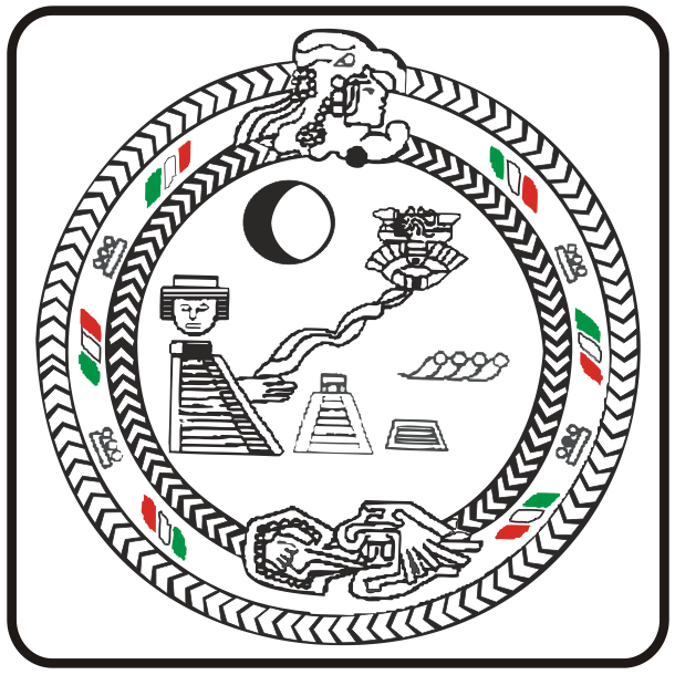 Escudo del Municipio de Solidaridad